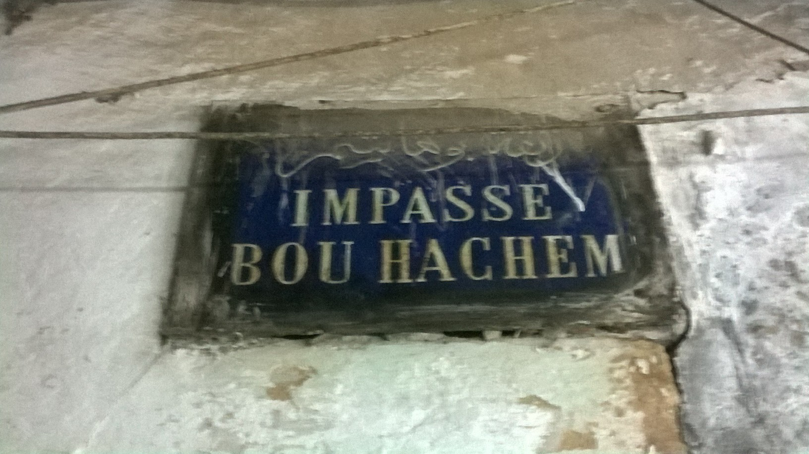 La médina de Tunis مدينة تونس العتيقة